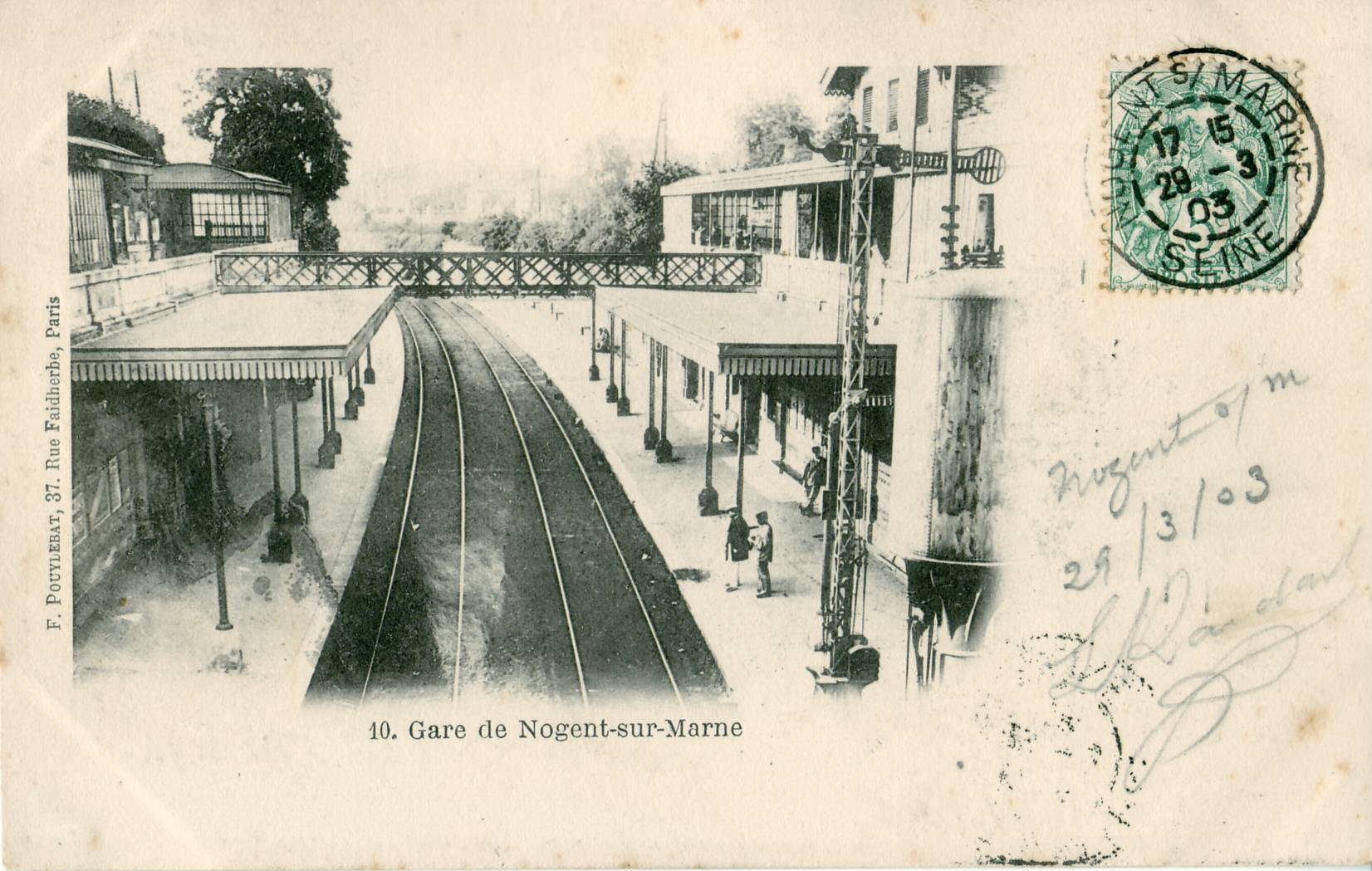 Carte postale ancienne éditée par Pouydebat, N°10 La gare de Nogent-sur-Marne alors nommée « Gare de Nogent - Vincennes ».